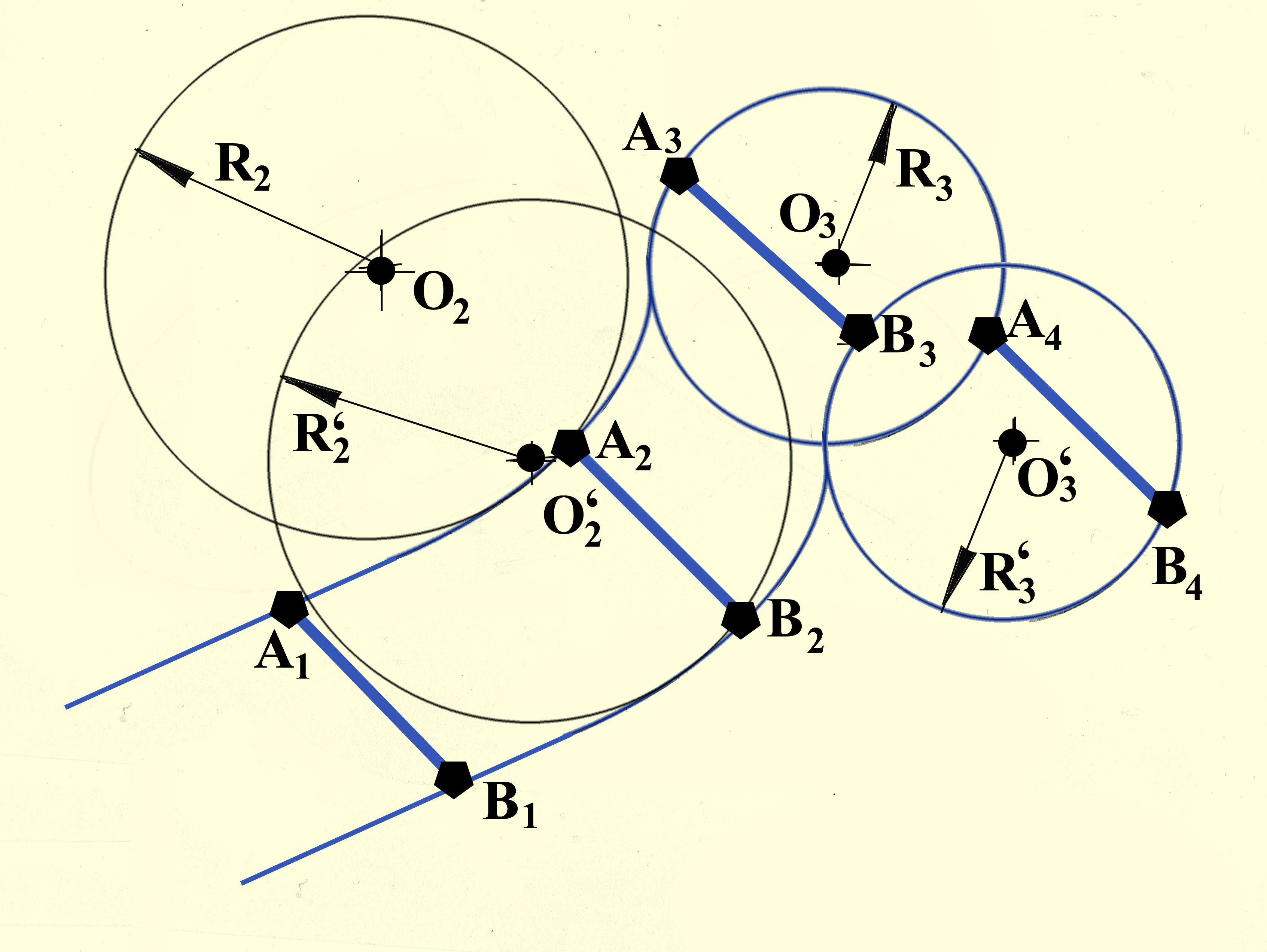 Иллюстрация поступательного движения одного и того же тела (на плоскости)